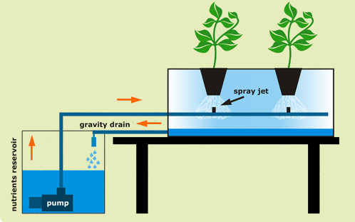 aeroponic, aeroponisches system